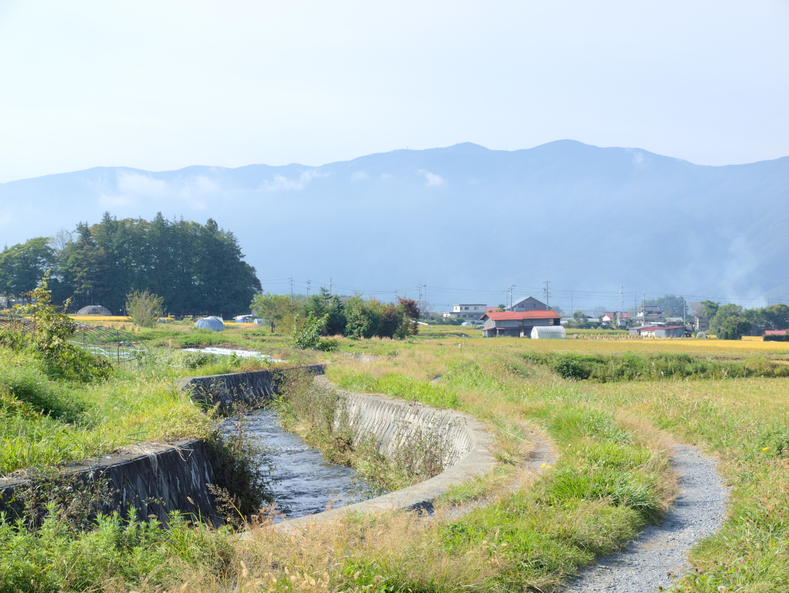 Tamagawa, Chino, Nagano Prefecture 391-0011, Japan